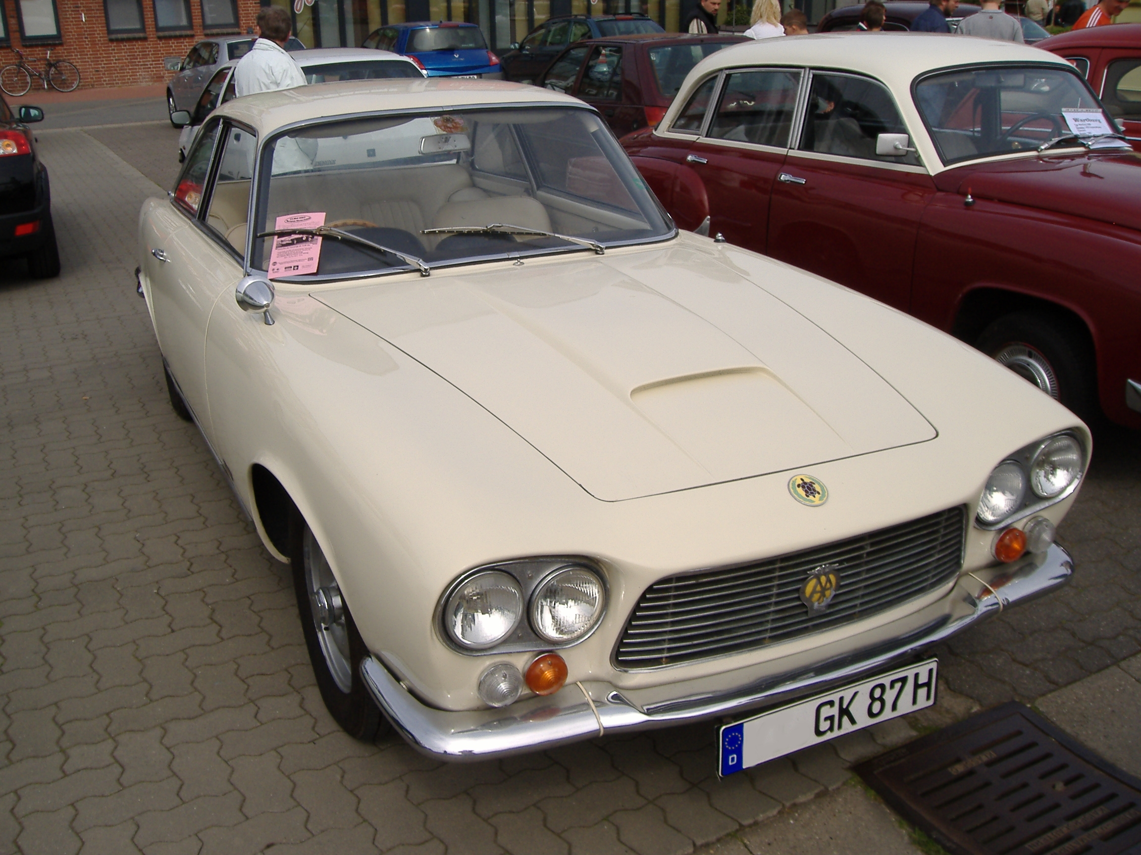 Gordon Keeble Frontansicht